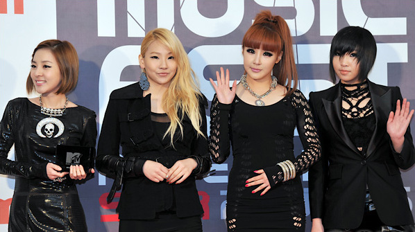 2NE1. 2011년 2월, MTV-DAUM 뮤직 페스트에서.